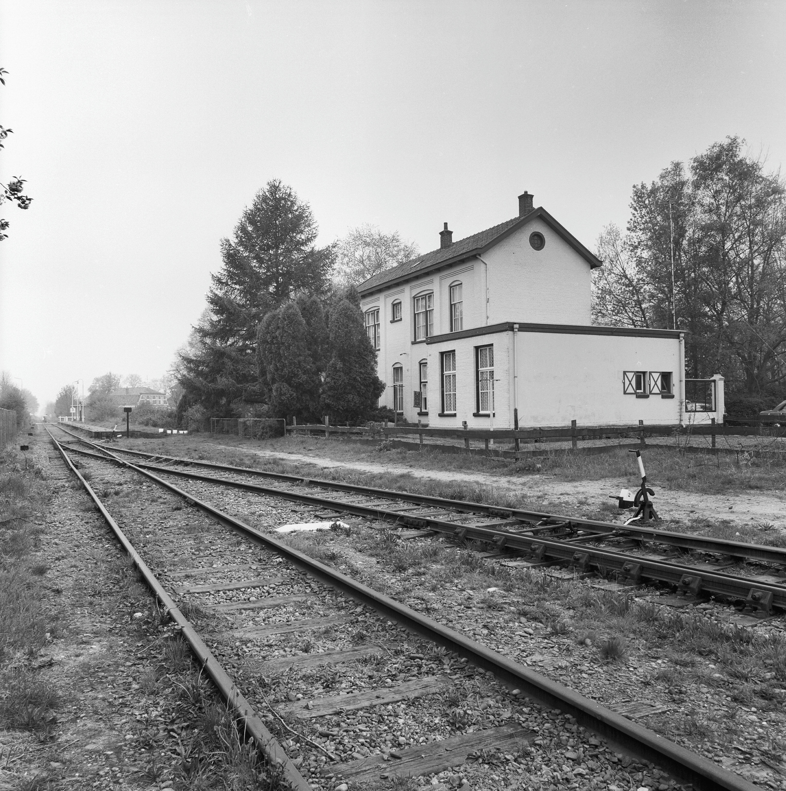 v.m. Station (thans woonhuis): perronzijde